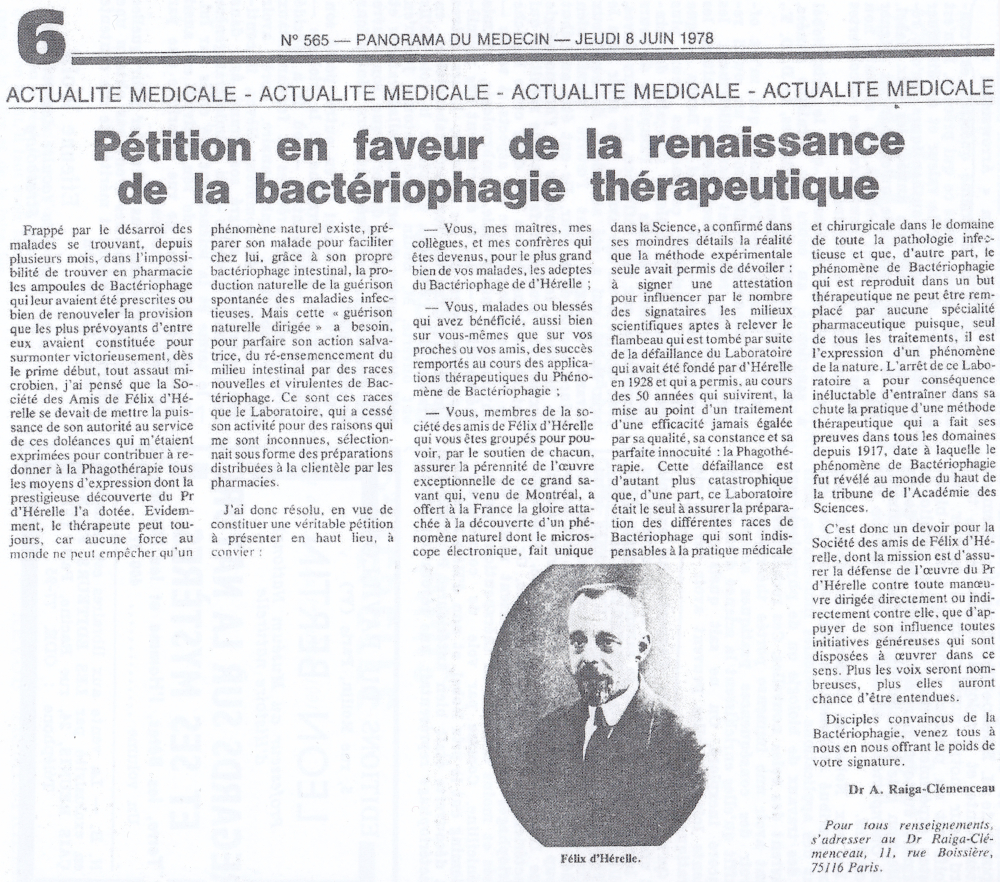 Pétition du Dr. Raiga-Clémenceau suite à la cessation d'activité des Laboratoires du Bactériophage